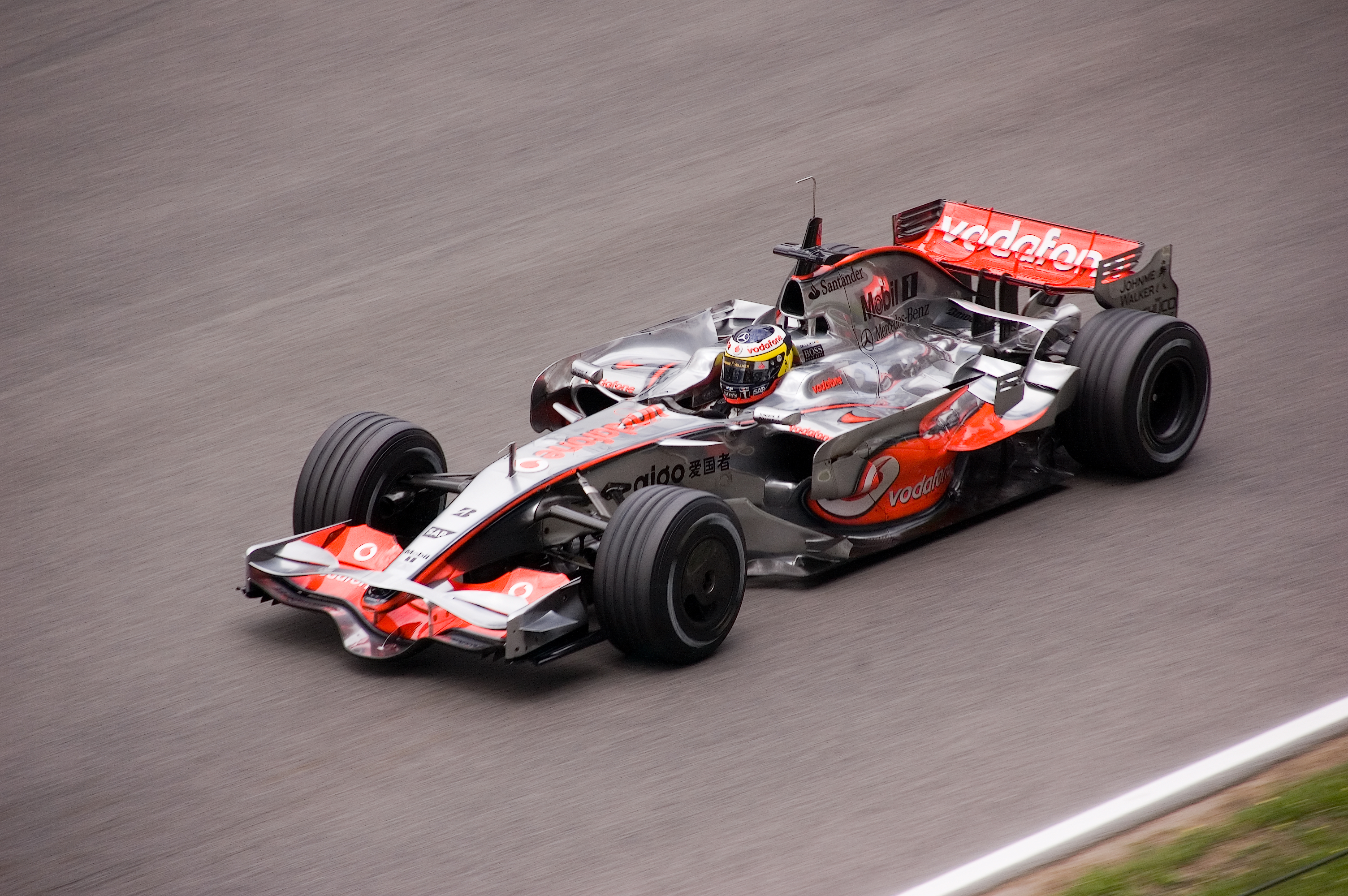 Pedro de la Rosa testing for McLaren at the Circuit de Catalunya in June 2008.